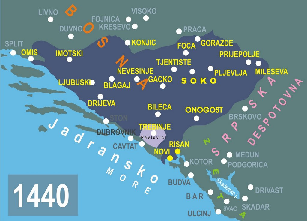 Vojvodstvo Stefana Vukčića Kosače, 1440. godine.